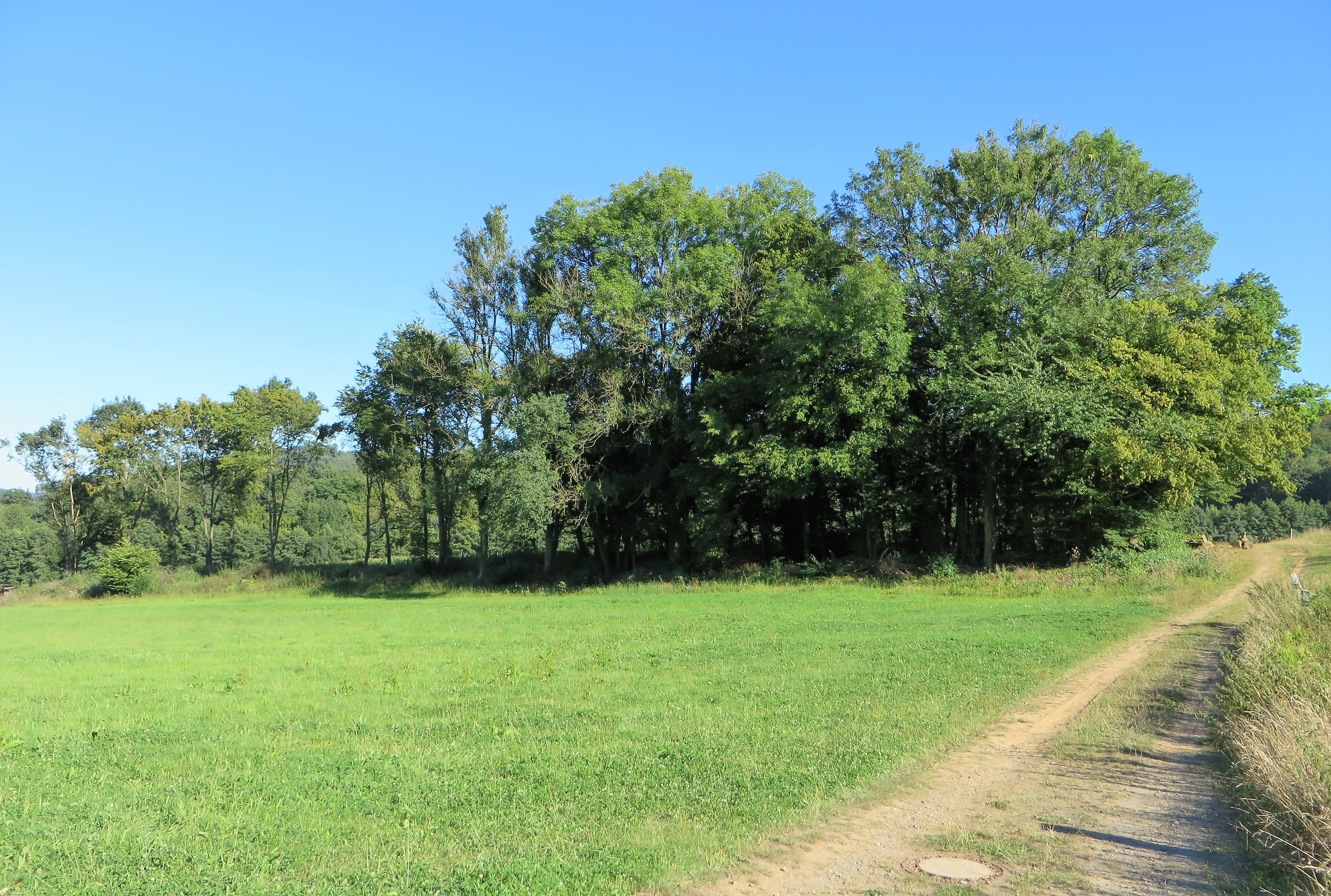 Geschützter Landschaftsbestandteil 1.4.2.59 „Niederwald Lüling“ in Hagen, östlich der Autobahn-Anschlußstelle Hagen-Süd nahe der Hofstelle Lüling. Es handelt sich um einen unterholzreichen Baumbestand, der anscheinend als Niederwald bewirtschaftet wurde. Im Landschaftsschutzgebiet Egge gelegen.